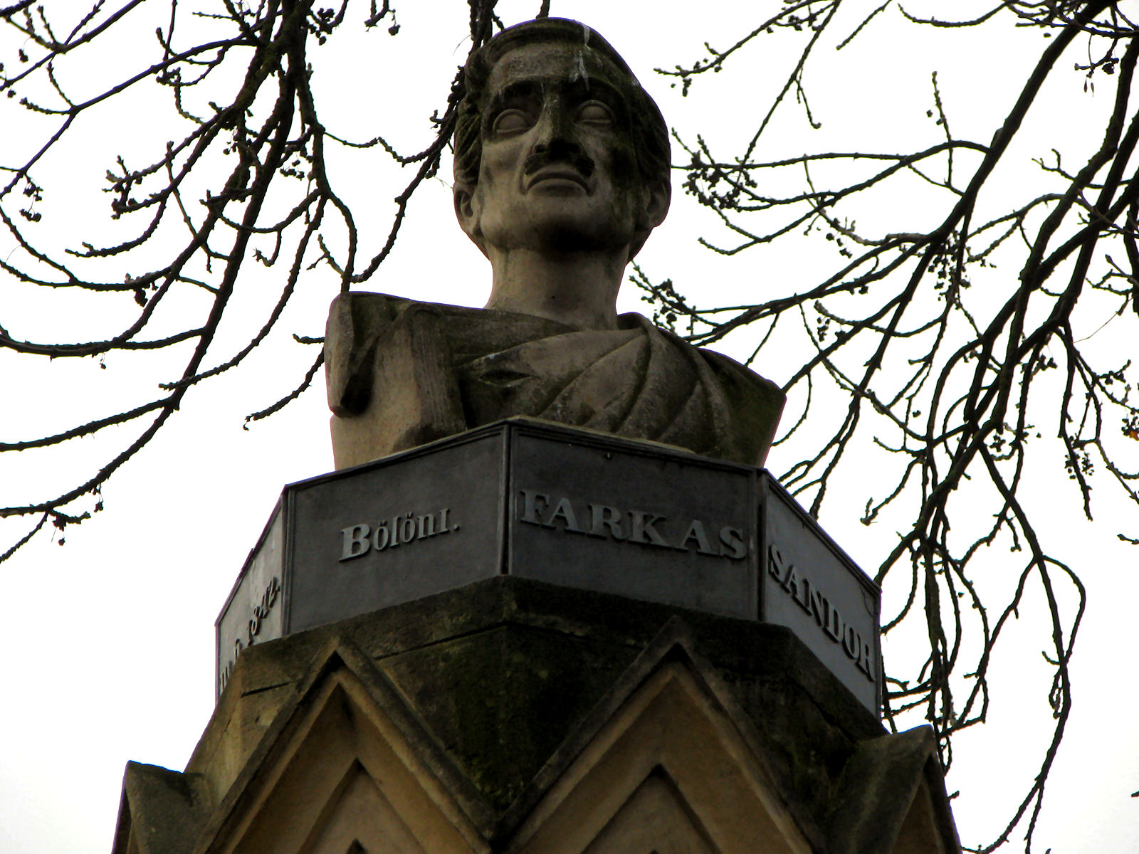 Bölöni Farkas Sándor sírja a kolozsvári Házsongárdi temetőben 127